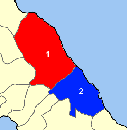 Χάρτης των ενοτήτων (και πρώην δήμων) από τις οποίες αποτελείται ο Δήμος Ζαγοράς-Μουρεσίου